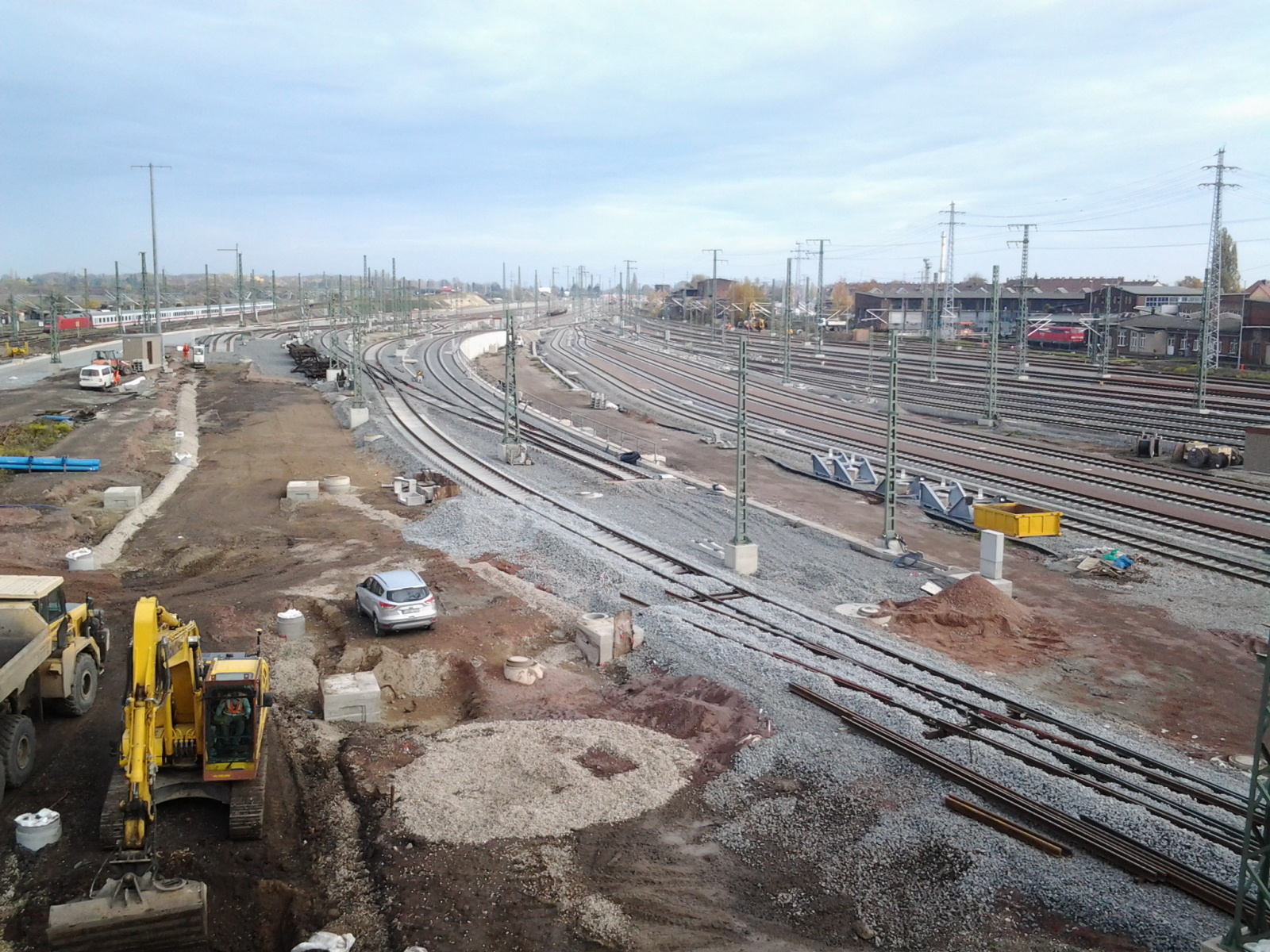 Halle Saale Güterbahnhof während der Umbauarbeiten im Jahr 2015, Blick von der Berliner Brücke in Richtung Nord.